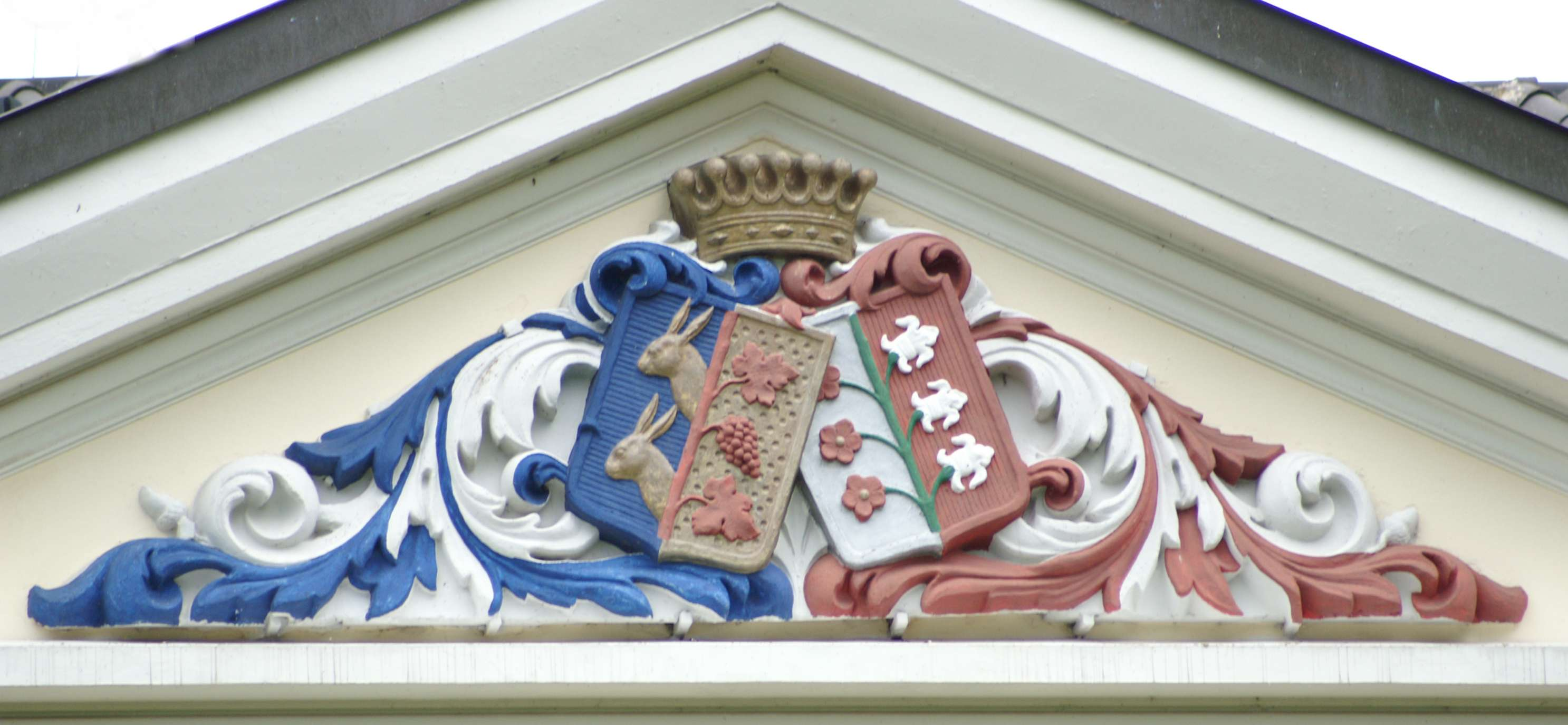 Vanselow - Landkreis Demmin - Herrenhaus - Wappen ueber dem Portal (Allianzwappen der Familien von Maltzahn und von Lücken)